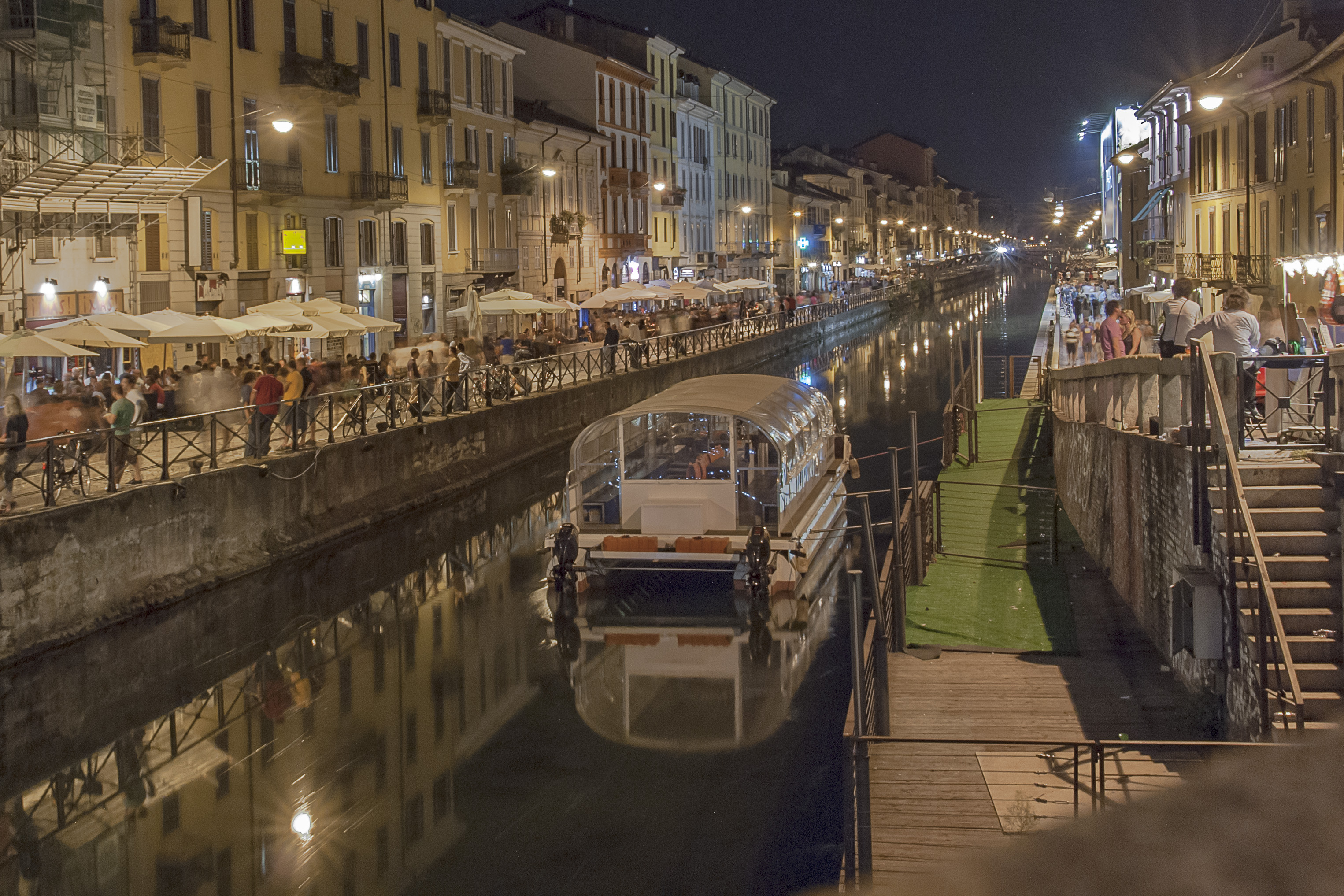 Dzielnica Navigli w Mediolanie (Włochy)